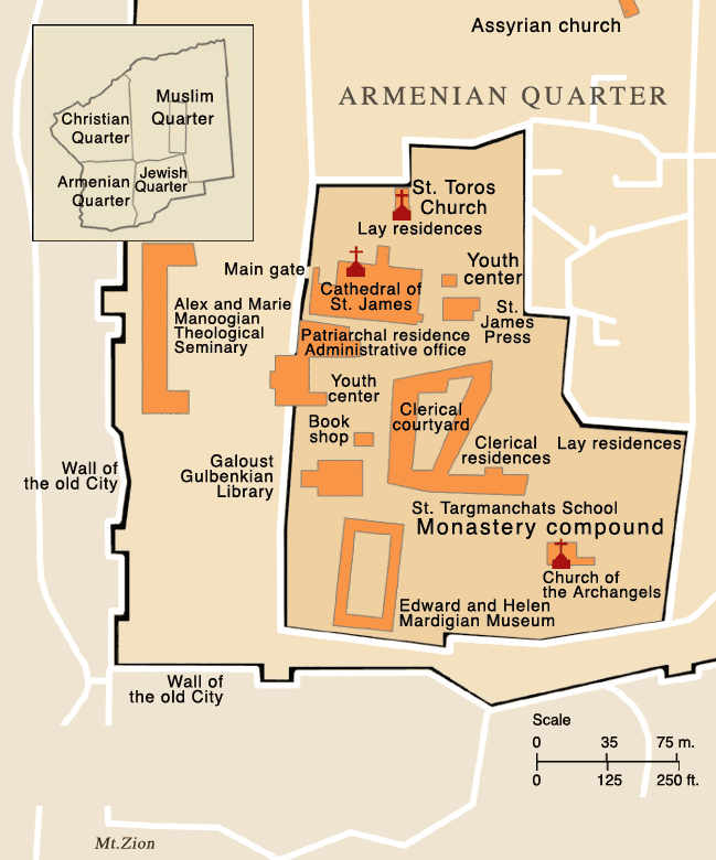 Ermeniniane kwartiri i Jarsa